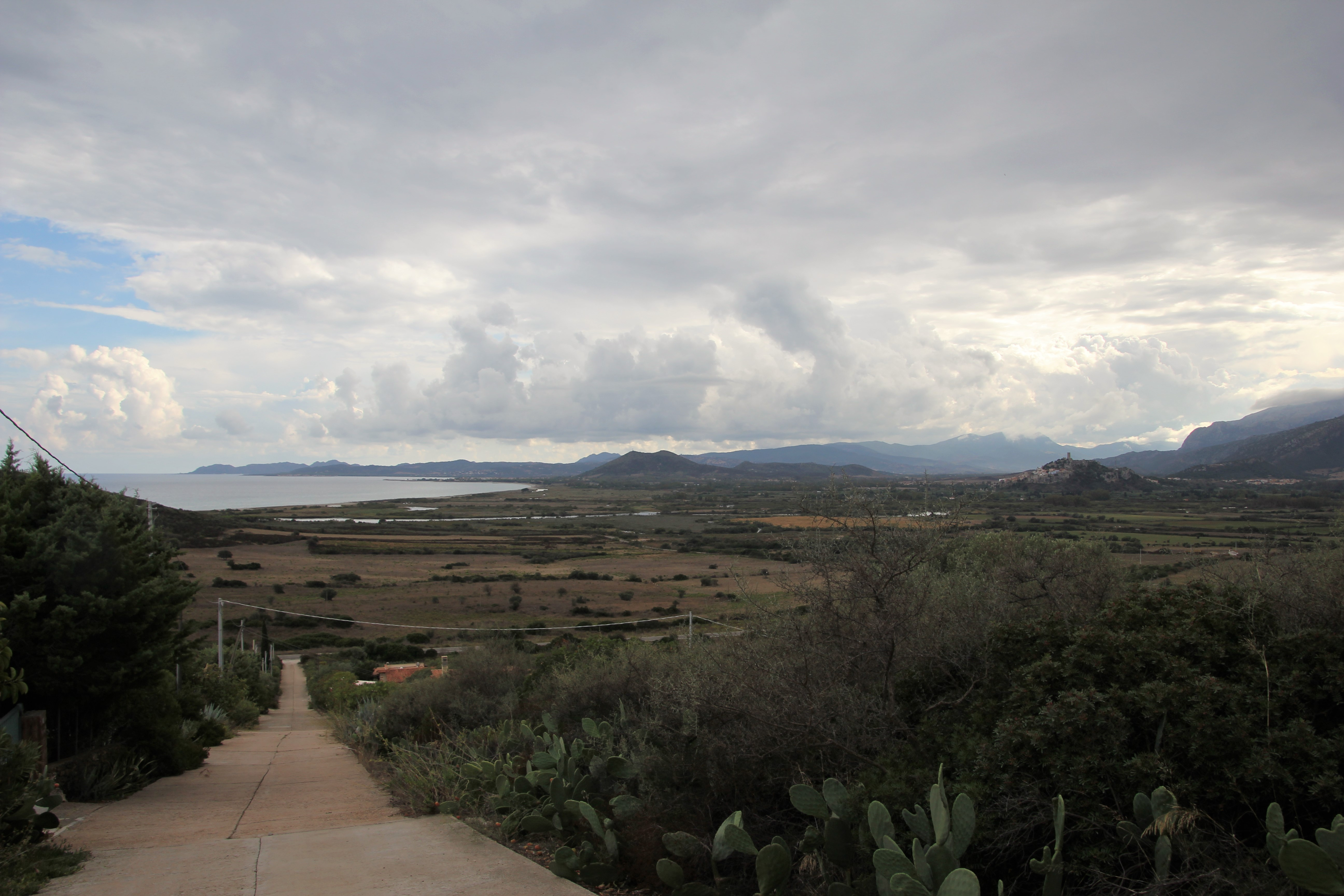 Barlonie, regione storica